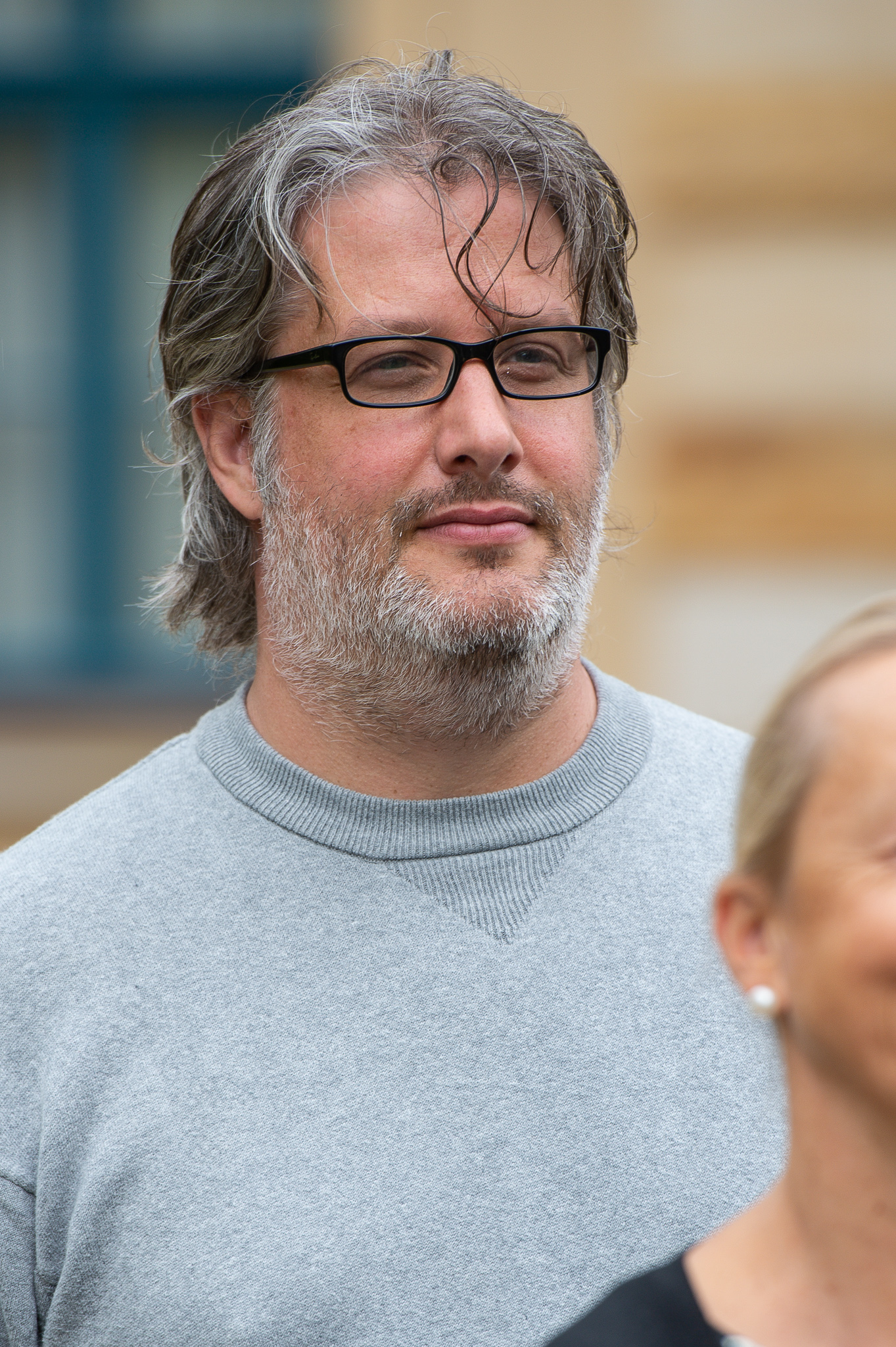 Bayerischer Rundfunk,Ein Tag wie jeder andere,Filmset,Franken-Tatort,Sebastian Marka,Tatort